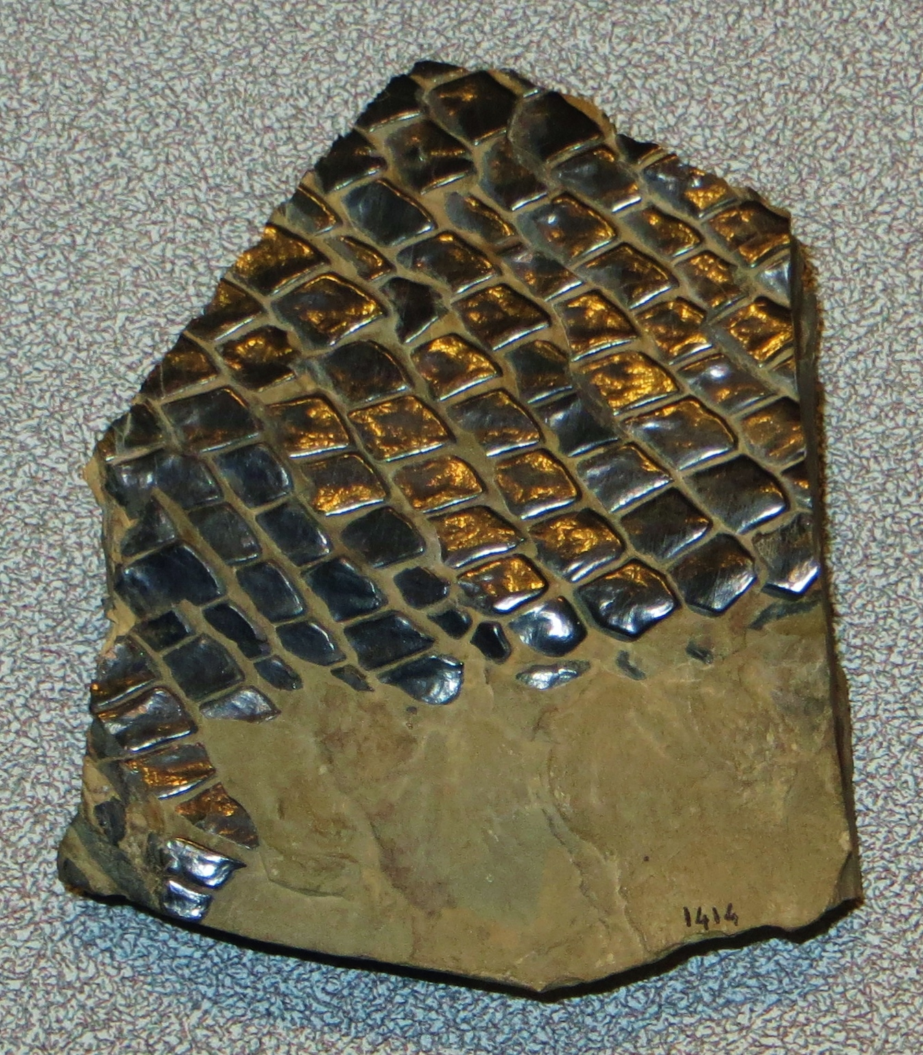 Fossil of Paralepidotus, an extinct fish- Took the picture at Museo di Scienze Naturali, Bergamo